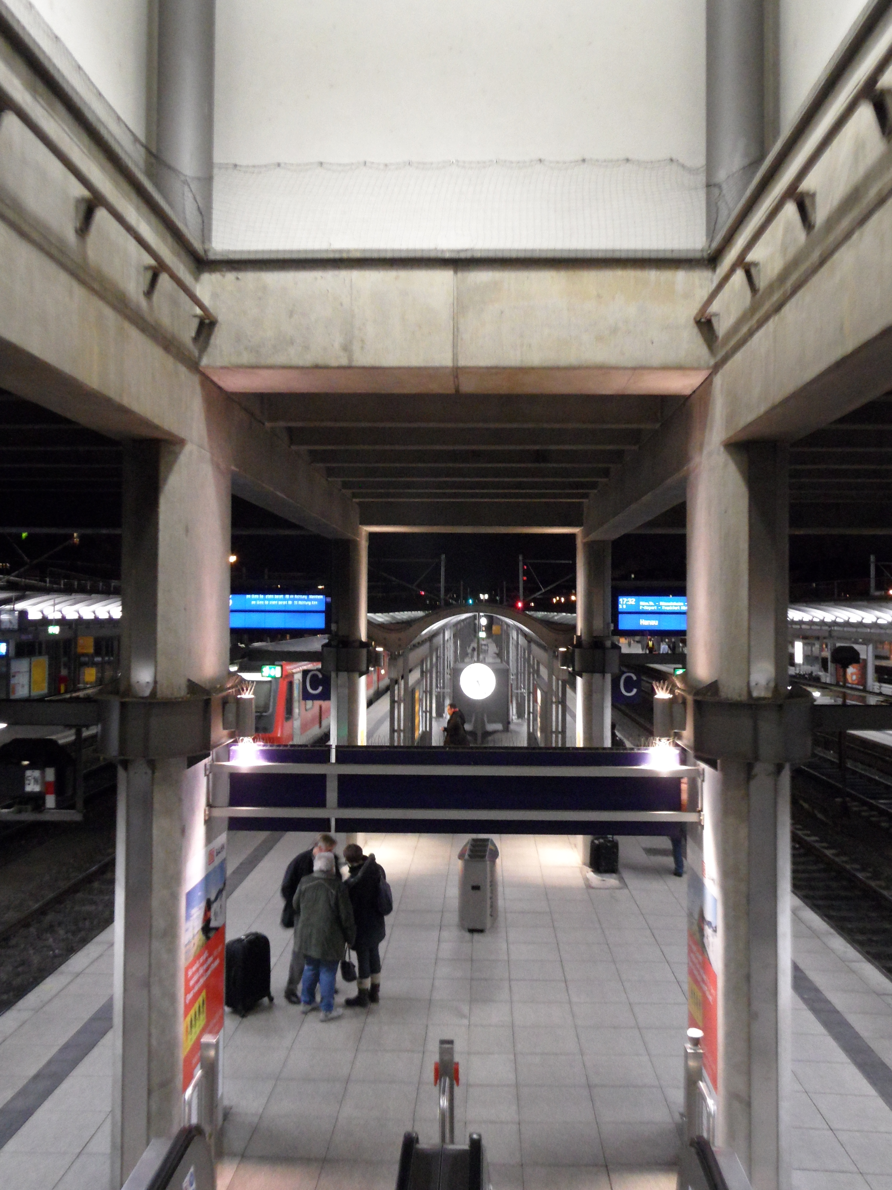 Mainz - Hauptbahnhof